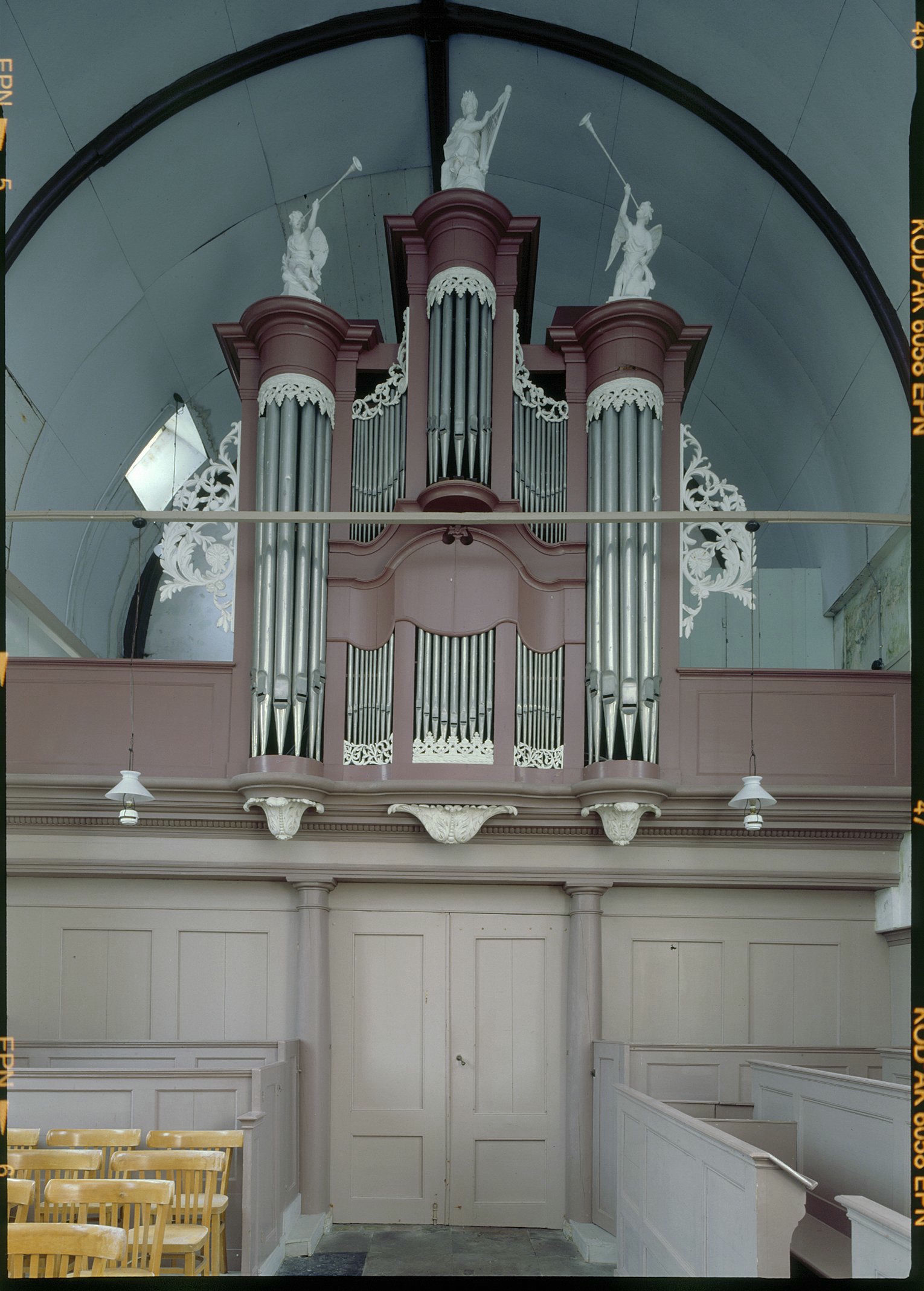 Nederlands Hervormde Kerk: Interieur, aanzicht orgel, orgelnummer 1658 (opmerking: Gefotografeerd voor Het Historische Orgel in Nederland 1840-1849)